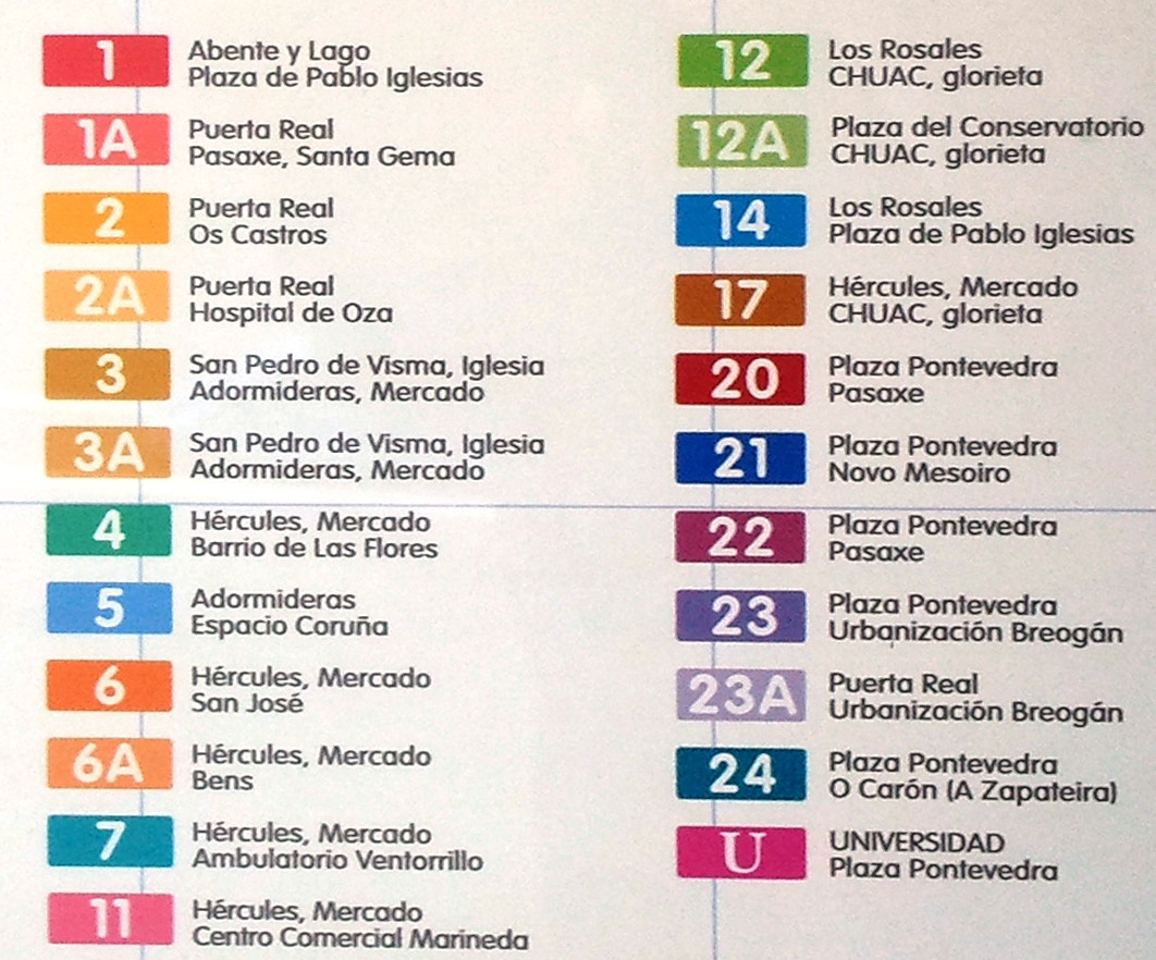 Líneas de bus urbano de La Coruña